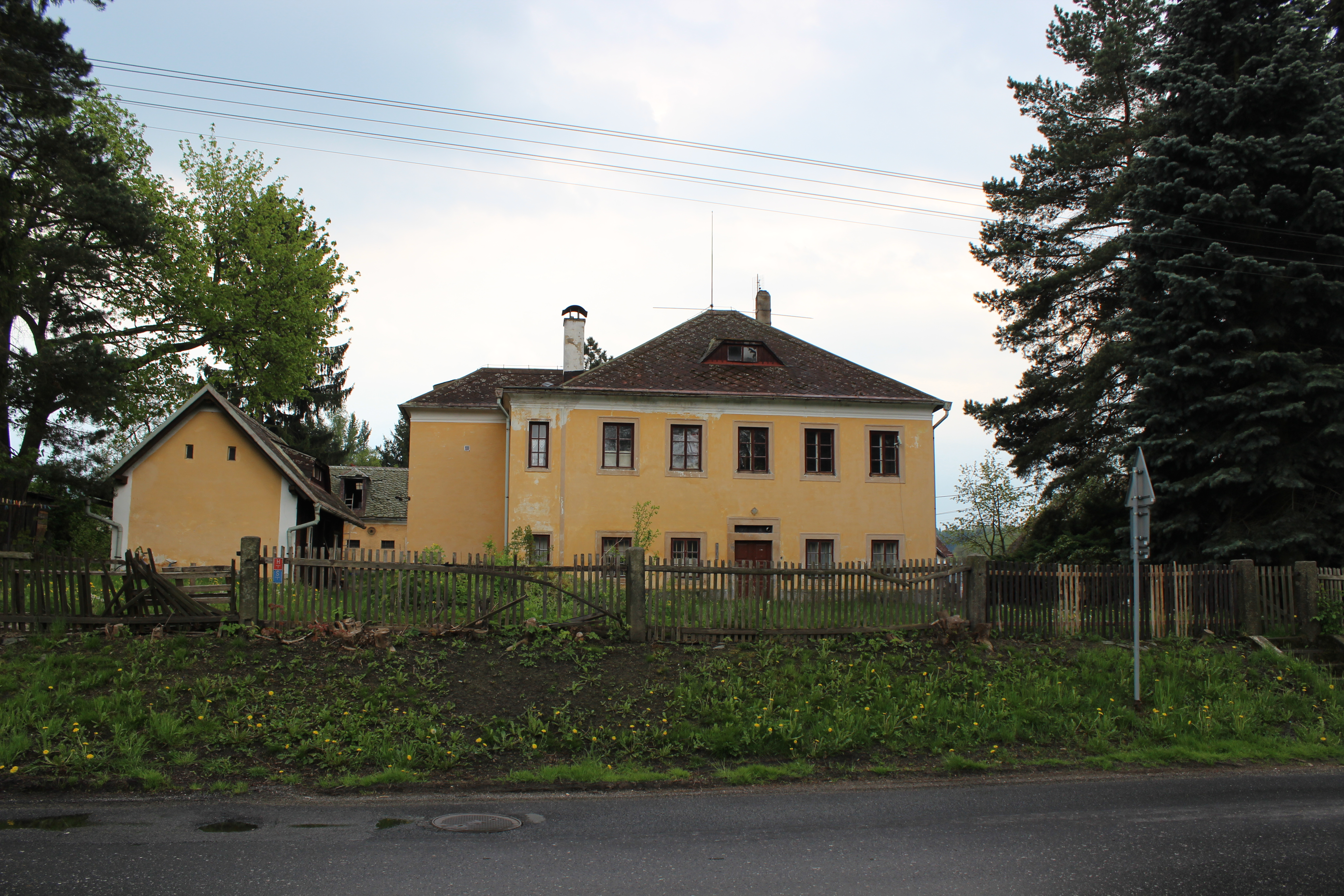 Fara (dům číslo popisné 41) v Mníšku u Liberce (pohled ze severozápadu od Oldřichovské ulice).